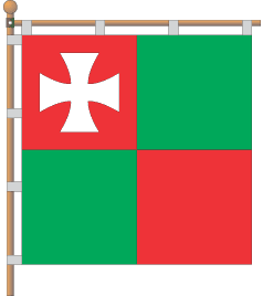 Прапор смт. Локачі